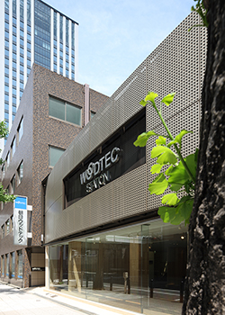 朝日ウッドテック大阪本社の写真 【投稿者による撮影_2011年】 photograph of "ASAHI WOODTEC head office" /Authorized by: asahi woodtec/ in Osaka / Source: Personal photograph